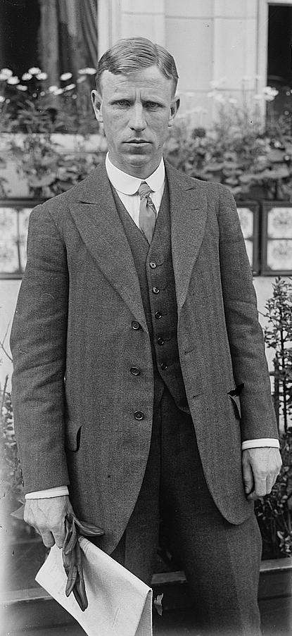 (Original description says "Stanley L. Doust"!)